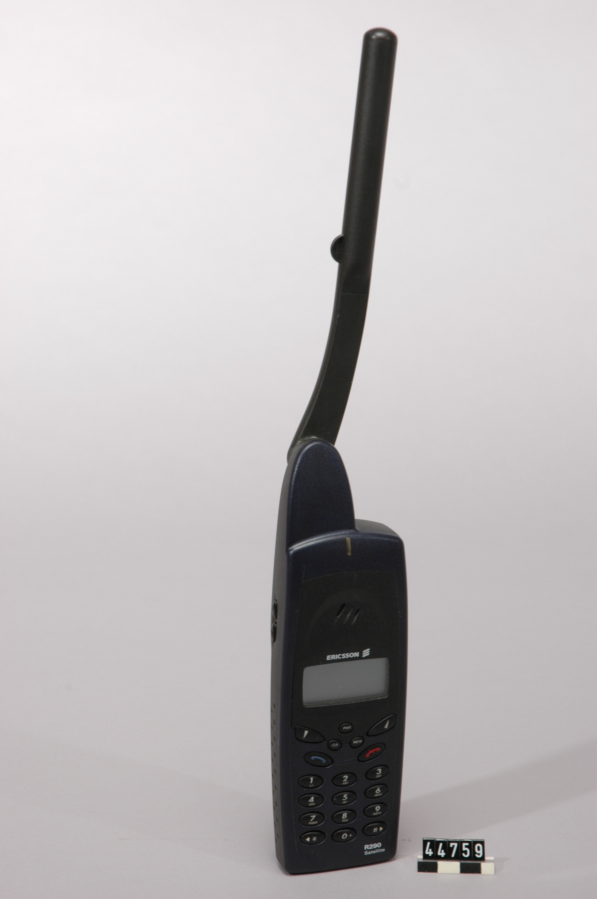 Ericsson R290 Satellite. Telefonen märkt:1180101-BV, 0046010100-88450, 99W49, GA2B066QMP ABB, KRY 118 12, Globalstar. Batteriet märkt:Li-Ion, 7,4V, 1050mAh, BKB 191326 R1A, S/N:93800359IDETFL. Överlämnad till Tekniska museet som exempel på aktuell produkt som en följd av samarbete kring utställningen "Mobilen" på Telemuseum 1999-2003